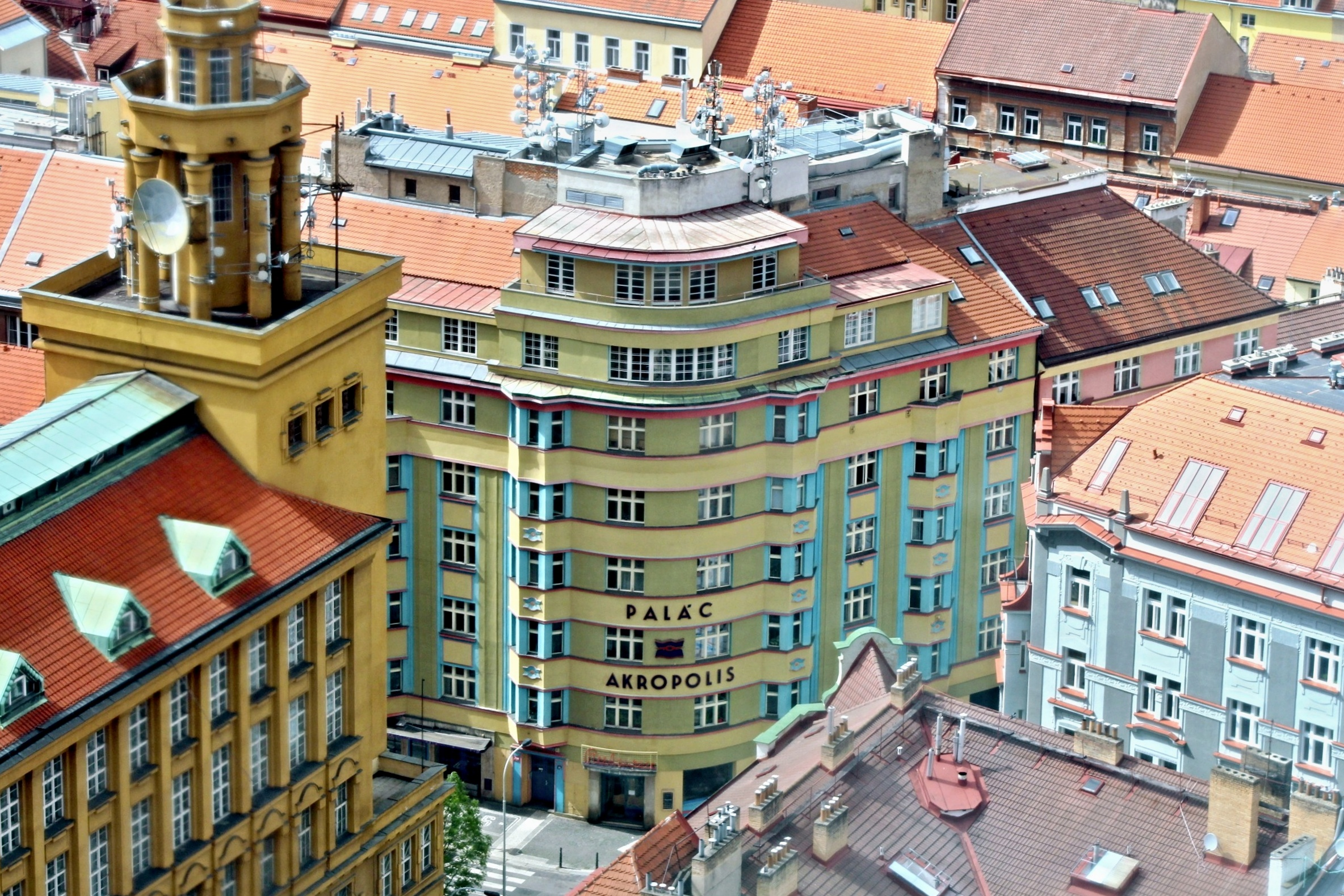 Palác Arkopolis na Žižkově